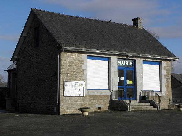 Mairie de Villamée (35).